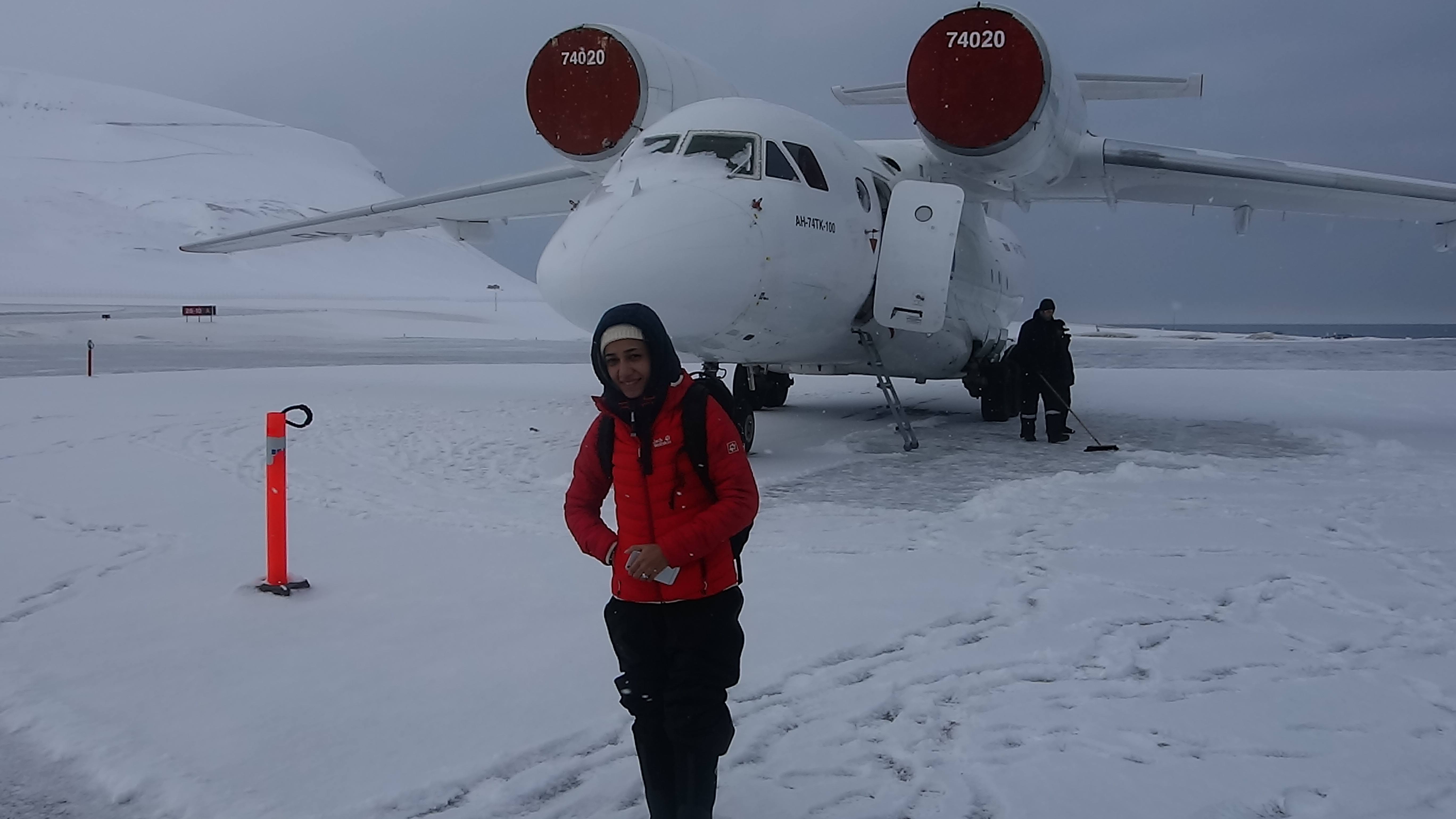 استعداد لركوب الطائرة Antonov An-74